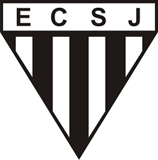 antigo simbolo do sao jose